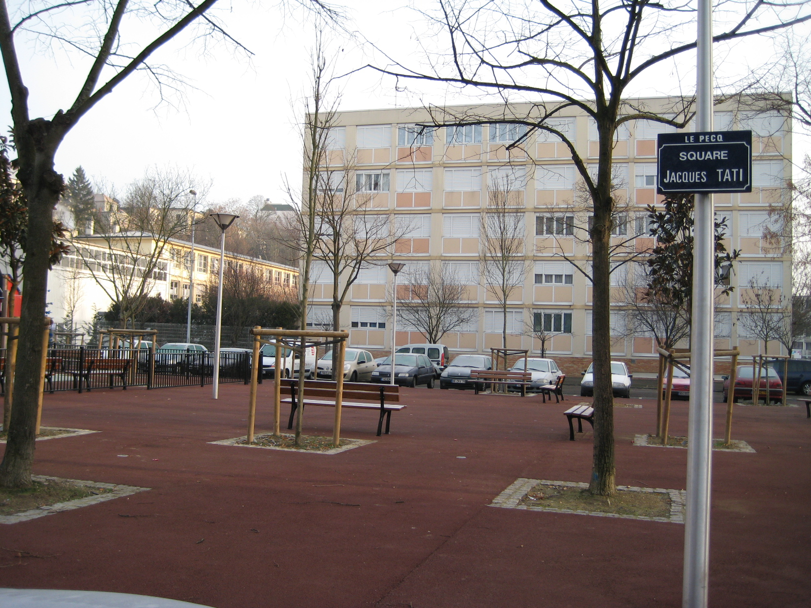 Skvaro Jacques Tati, Le Pecq